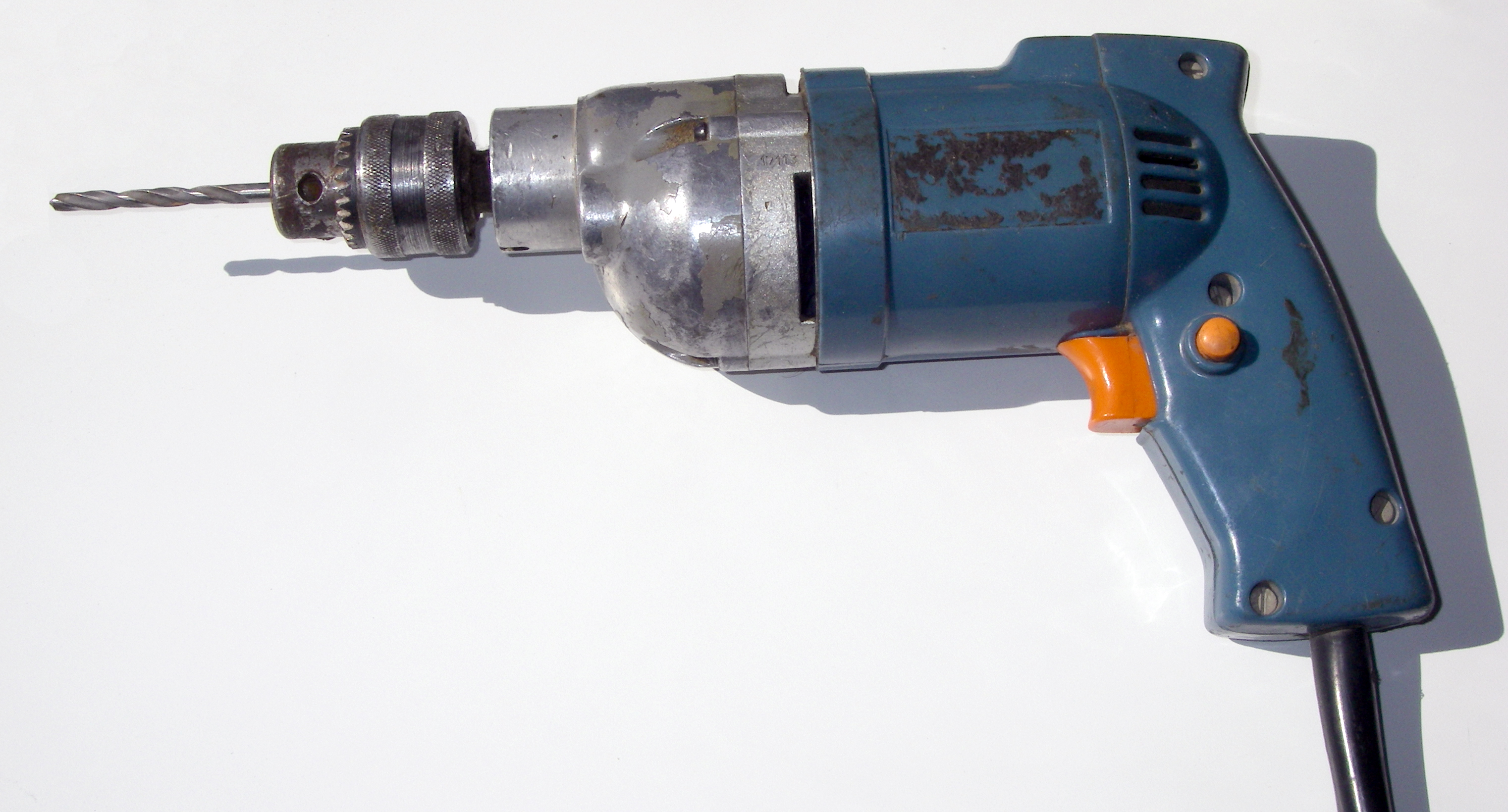 Old USSR drill, 420W.